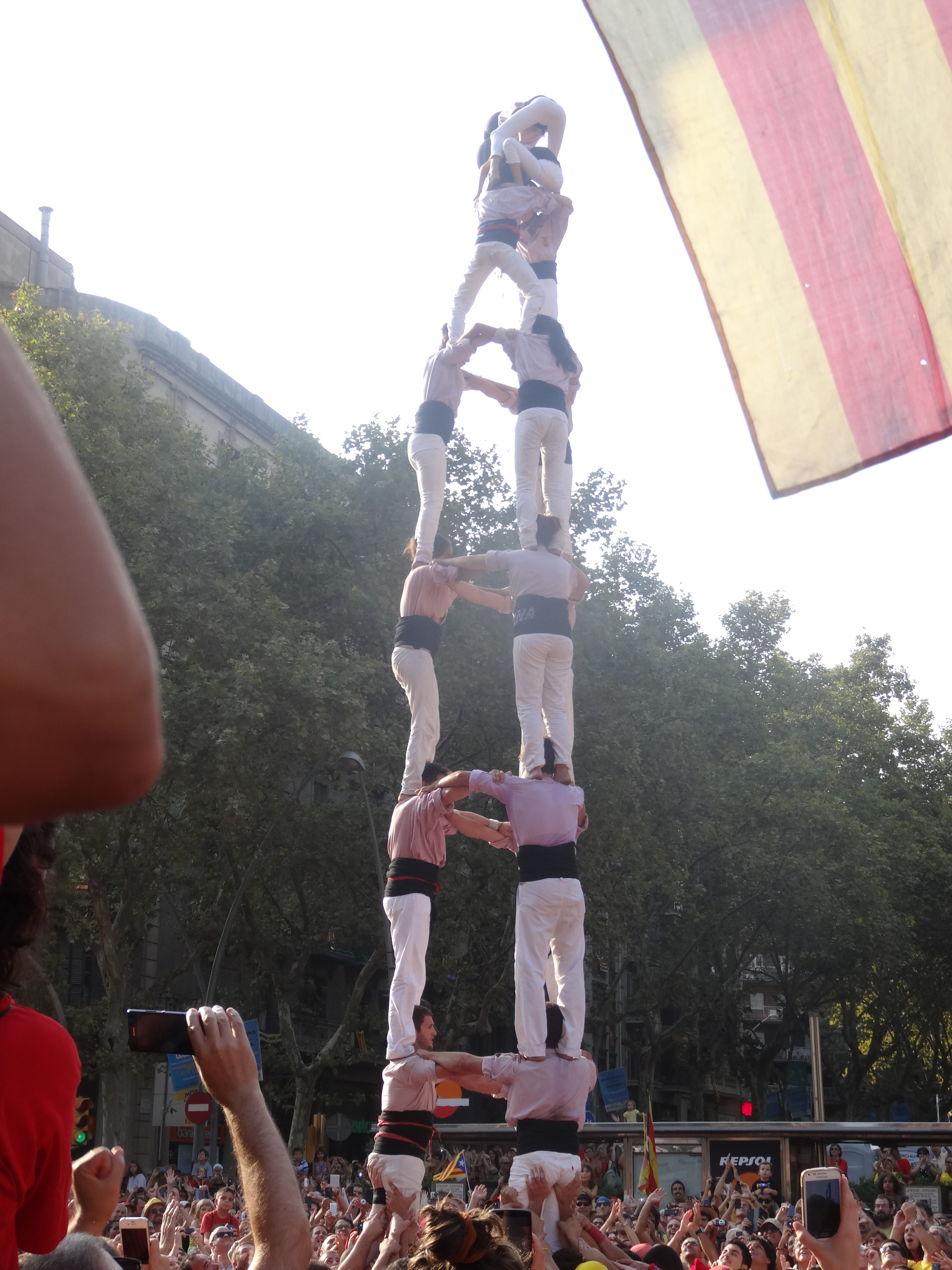 V Catalana - 3 de 8 dels Minyons de Terrassa, al costat del Monument a Verdaguer, Barcelona.